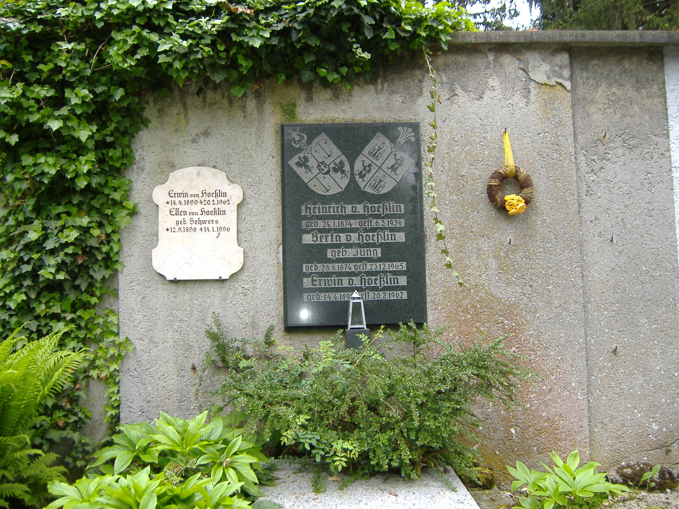 Grabstääte von Hoesslin